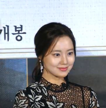 8월 13일 오후 서울시 동대문구 메가박스 동대문에서 영화 '명당' 제작보고회가 열려 박희곤 감독, 조승우, 지성, 백윤식, 김성균, 문채원, 유재명, 이원근 배우가 참석해 포토토임을 진행했다.